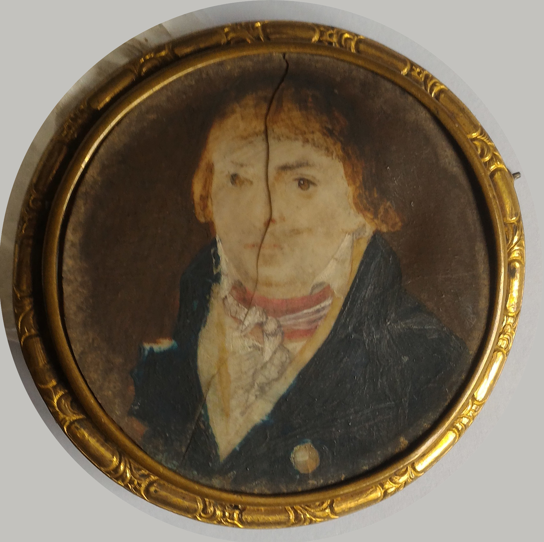 Médaillon de Jacques-Pierre SOYER, Baron de BEAUCEHE Archive familiale